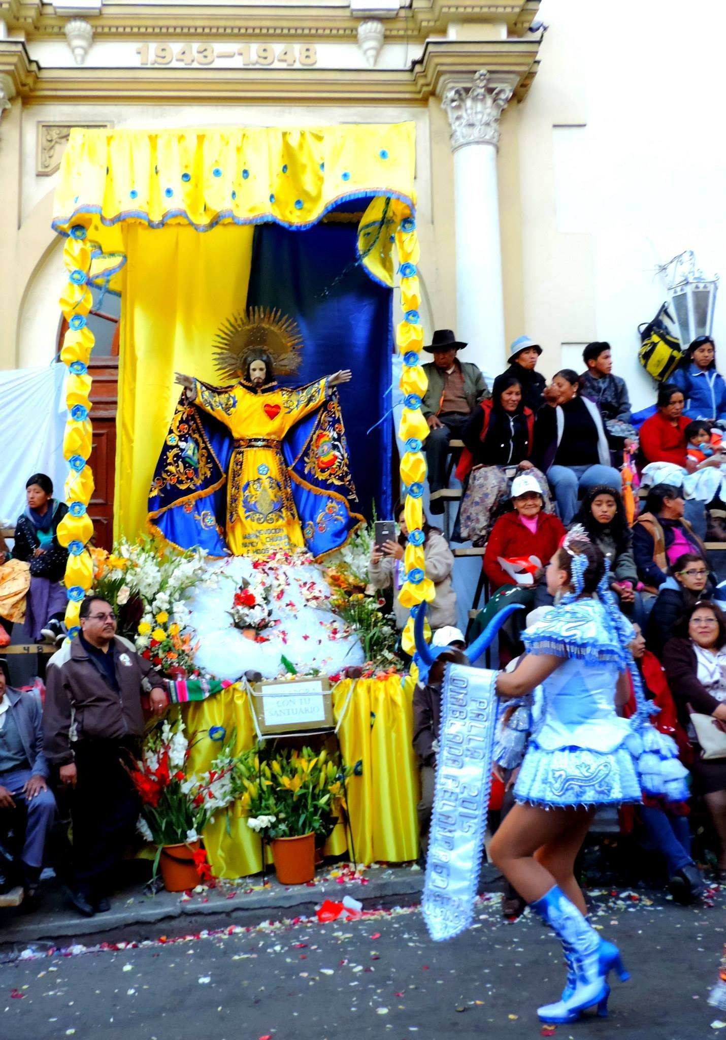 La Paz Bolivia 2015